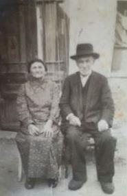 בני הזוג גולדאוור